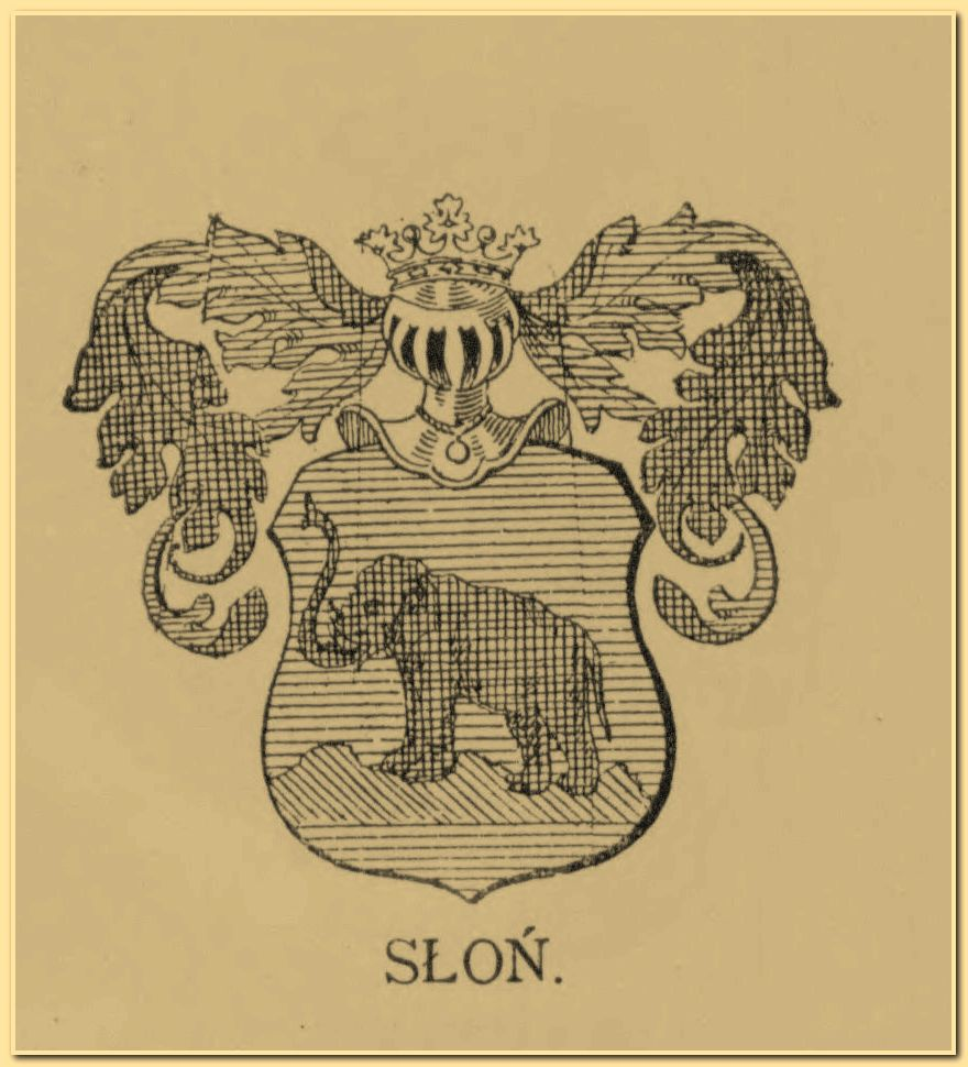 Słoń herb szlachecki wg Juliusza Ostrowskiego